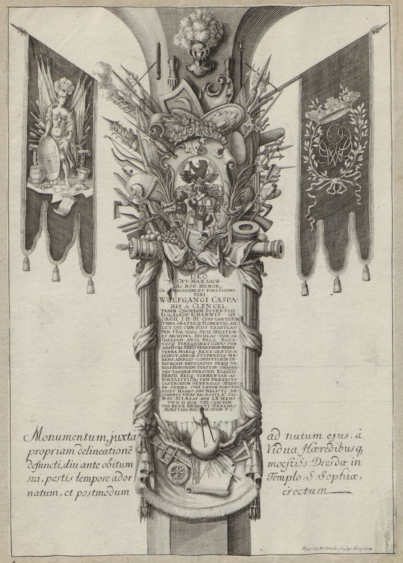 Grafik aus dem Klebeband Nr. 16 („Leichbegängnisse“) der Fürstlich Waldeckschen Hofbibliothek Arolsen Motiv: Totenschild für den Baumeister Wolf Caspar von Klengel (1630–1691)